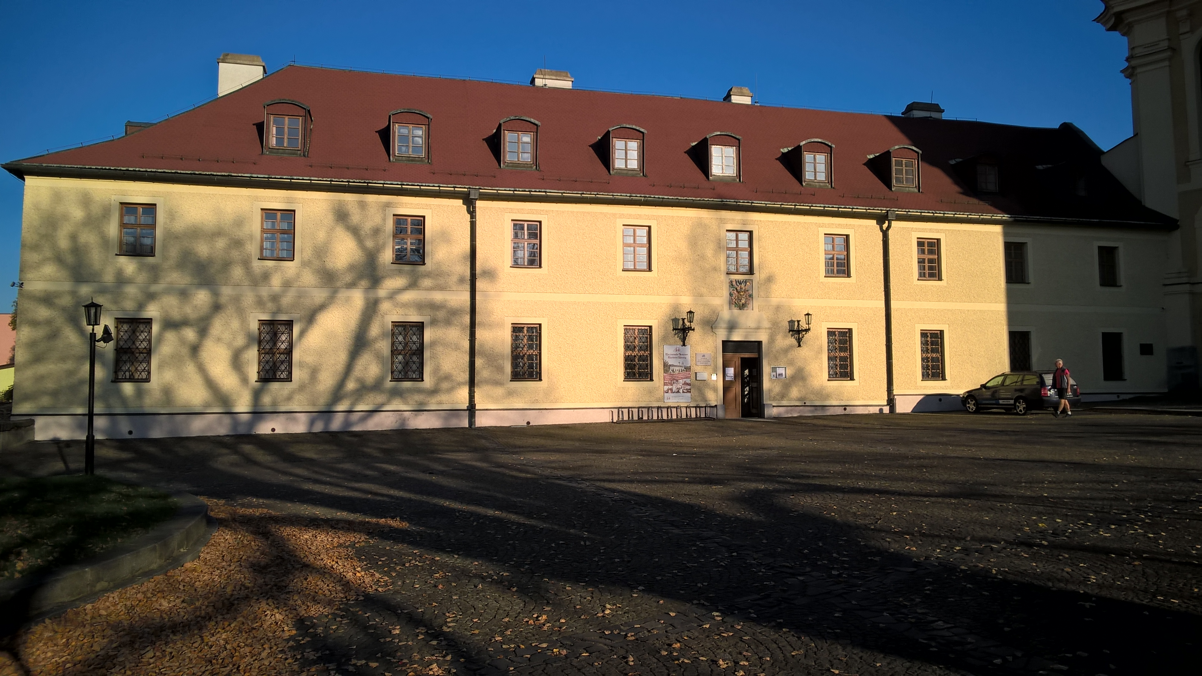 Klášter Hejnice, Hejnice 1, Hejnice.